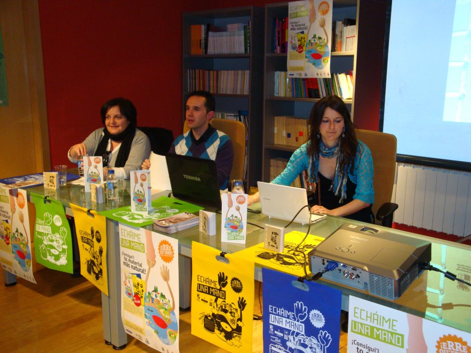 Presentación de la campaña de mediu ambiente "Echái una mano al mundu"